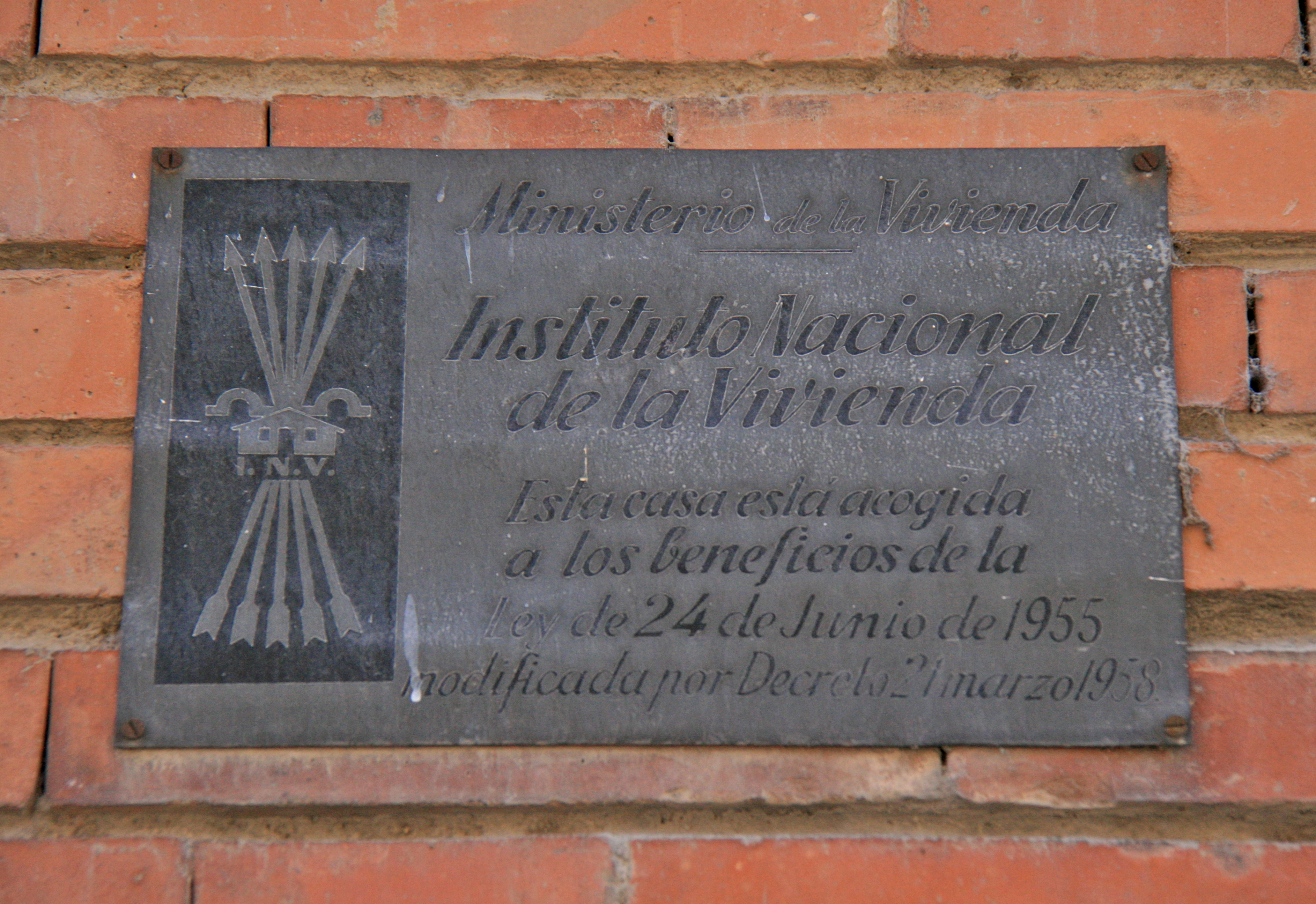 Cartel de las Viviendas del Instituto de la Vivienda - Madrid